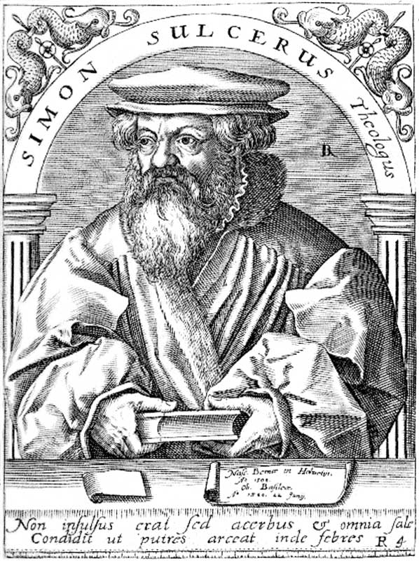 Kupferstich Simon Sulzer (1508-1585); Theologe